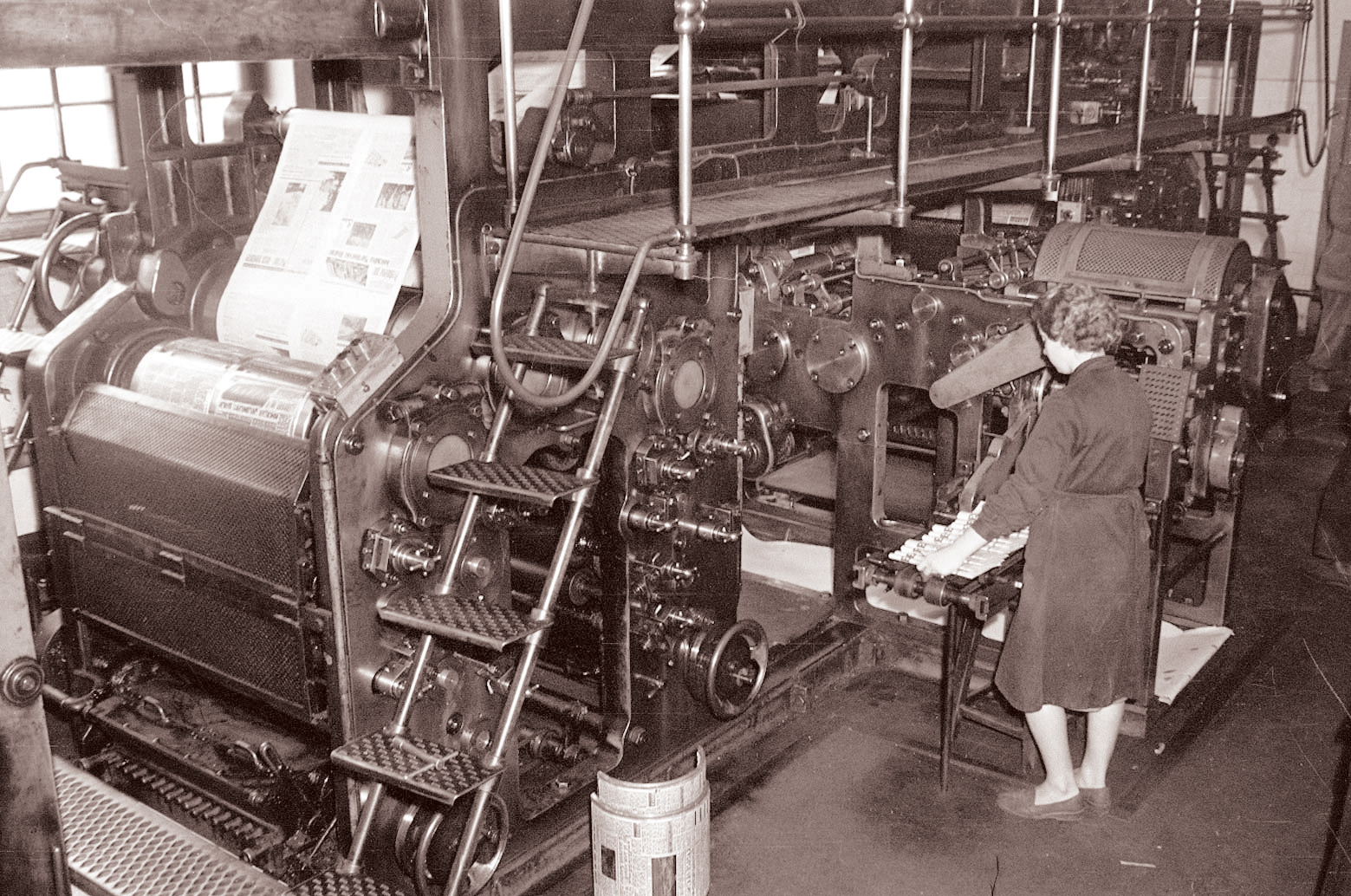 Mariborska tiskarna - rotacija - tiskanje časopisa